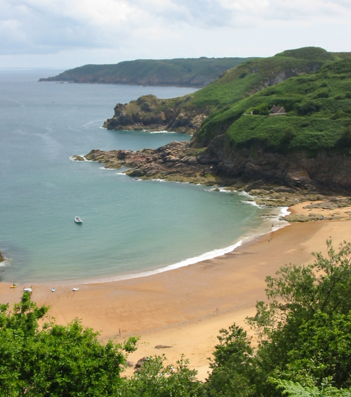 Nrf: Saint Ouën, Jèrri, 5 d'Juilet 2009